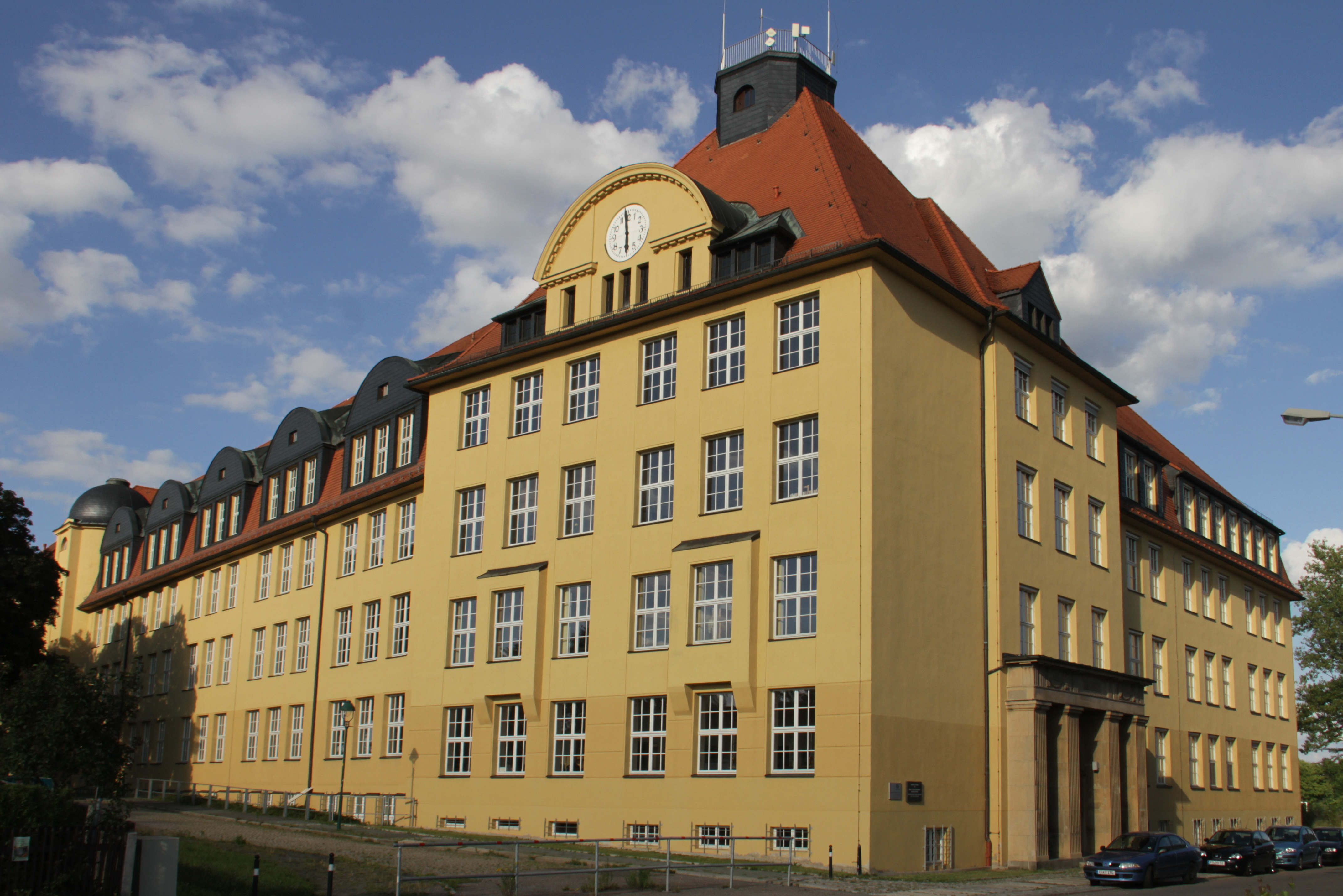 Kulturdenkmal im Chemnitzer Stadtteil Sonnenberg Objekt-ID und Adresse bitte dem Dateinamen entnehmen